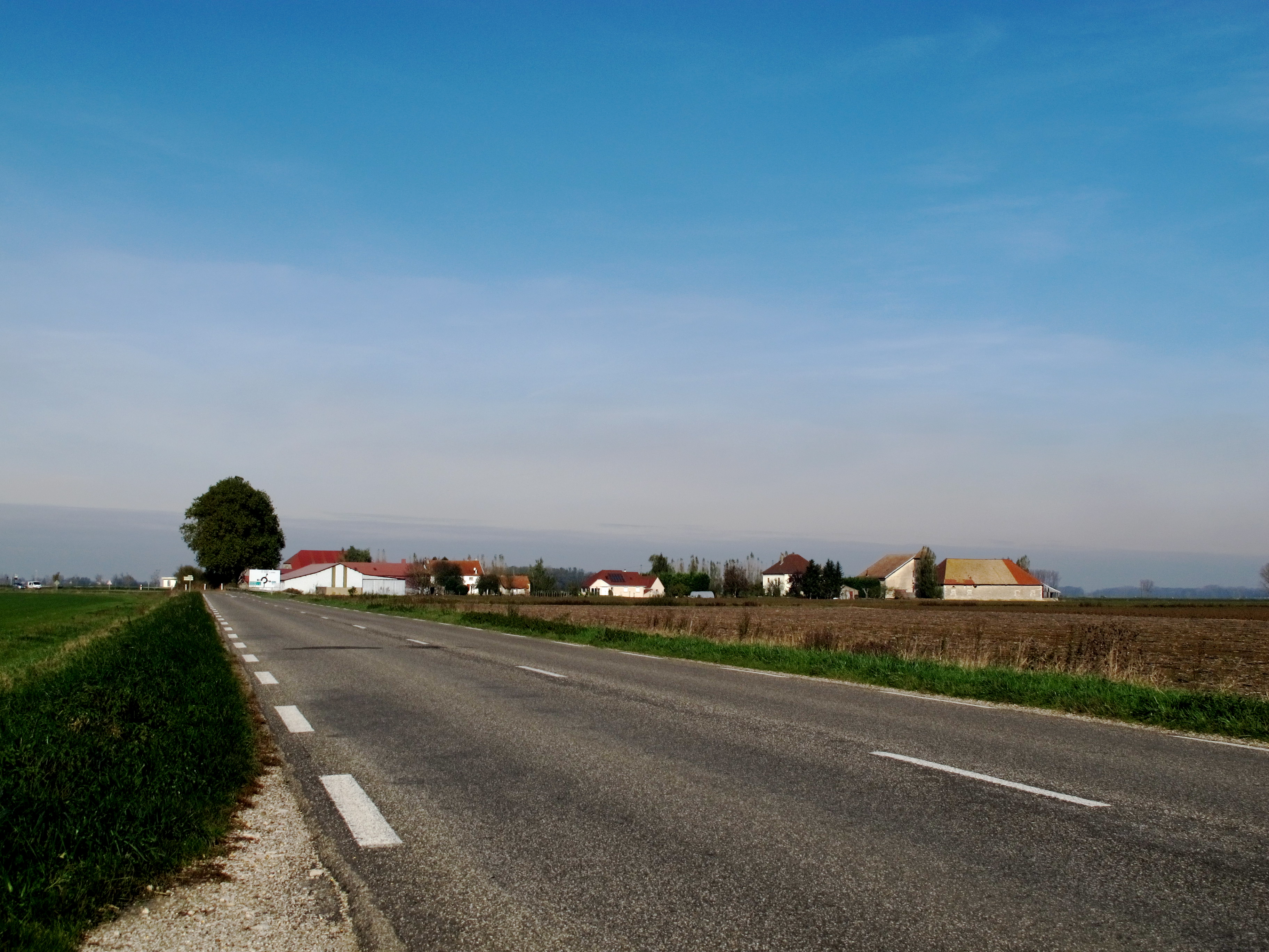 Carrefour très ancien dit de "La Borde Dame Nicole"